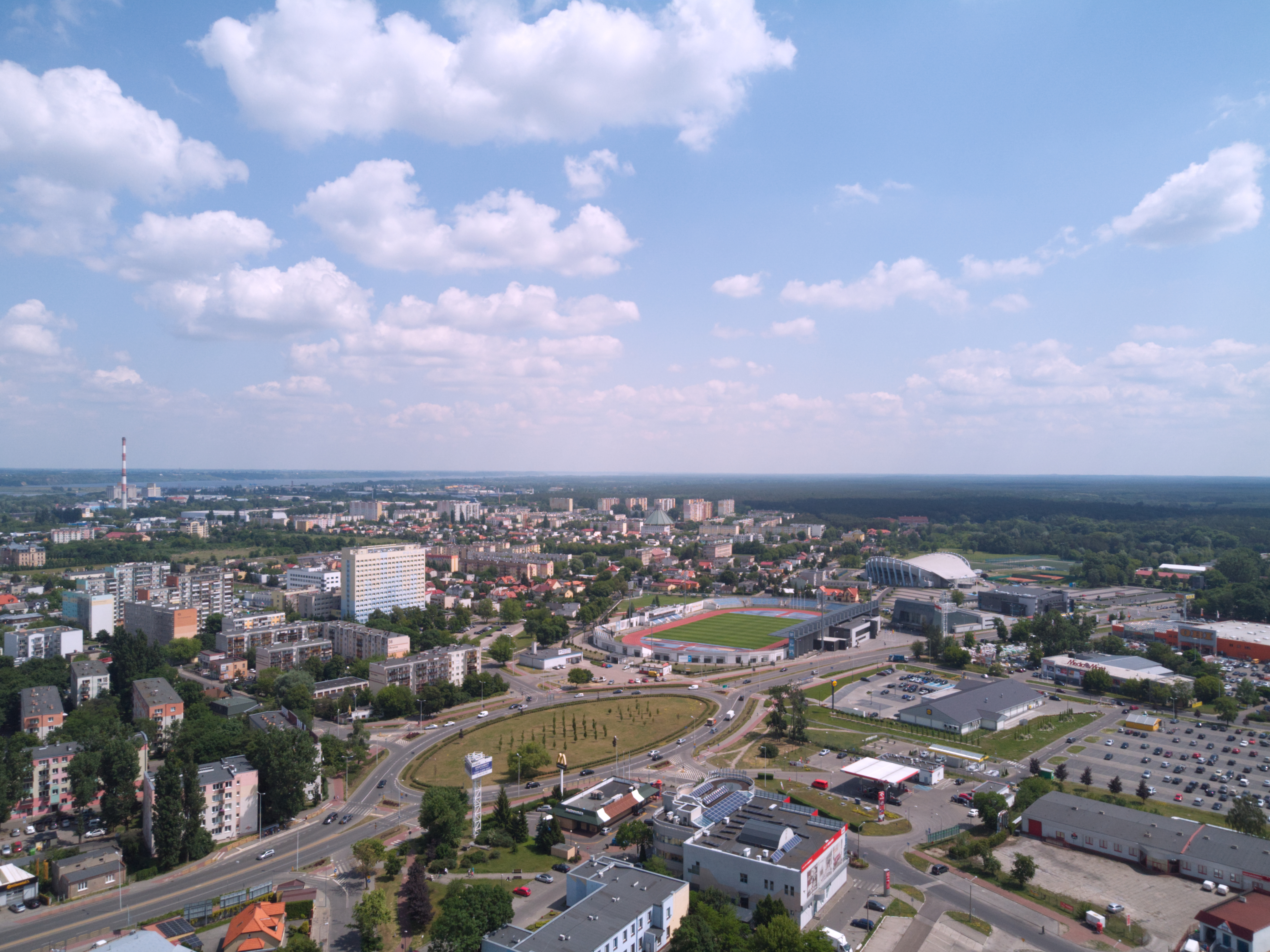 Dzielnica Śródmieście z lotu ptaka (2020 r.)